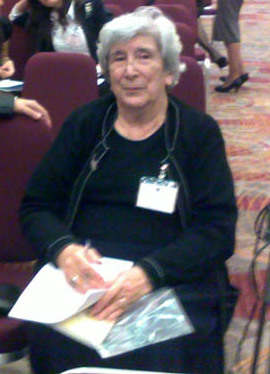 Adil Əsədov Bakı Beynəlxalq Humanitar Forumunda iştirak etmişdir. Adil Əsədov və Zümrüd Quluzadə